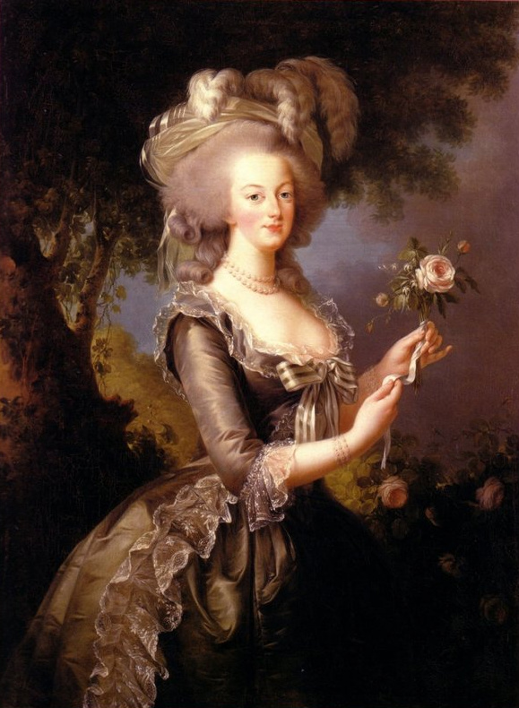 Maria Antonietta con una rosa: «In un paesaggio campestre che ricorda la vegetazione del Trianon, una giovane donna che indossa un abito di seta azzurra con drappeggi a sbuffo sui fianchi e ornato di merletto tiene tra le lunghe mani una rosa sbocciata, simbolo dell'effimero. Offre quel fiore come sembra offrire quel petto voluttuoso, del quale si intravedono i contorni attraverso una leggera balza di chiffon. Il collo lungo e sinuoso, ornato da due file di perle, conferisce una grazia maestosa a quella figura elegante. La bocca carnosa nel lungo ovale del volto è maliziosa, ma lo sguardo azzurro, capace di esprimere benevolenza o ostilità con notevole intensità, tradisce un tocco di melanconia.» (Evelyn Lever, Maria Antonietta - L'ultima regina, Milano, 2007) Questo e' forse il ritratto più conosciuto della regina e alla Le Brun vennero commissionate molte copie con lo stesso soggetto.